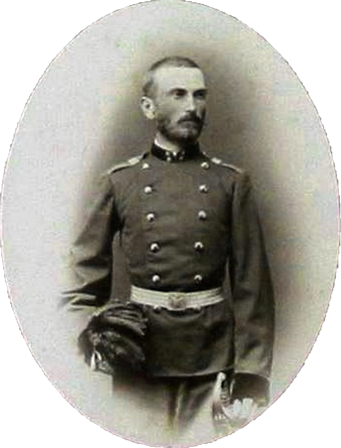 Милован С. Павловић као поручник. Фотографија из фонда Војног музеја у Београду, из албума официрског кора поводом пунолетства кнеза (касније краља) Милана Обреновића